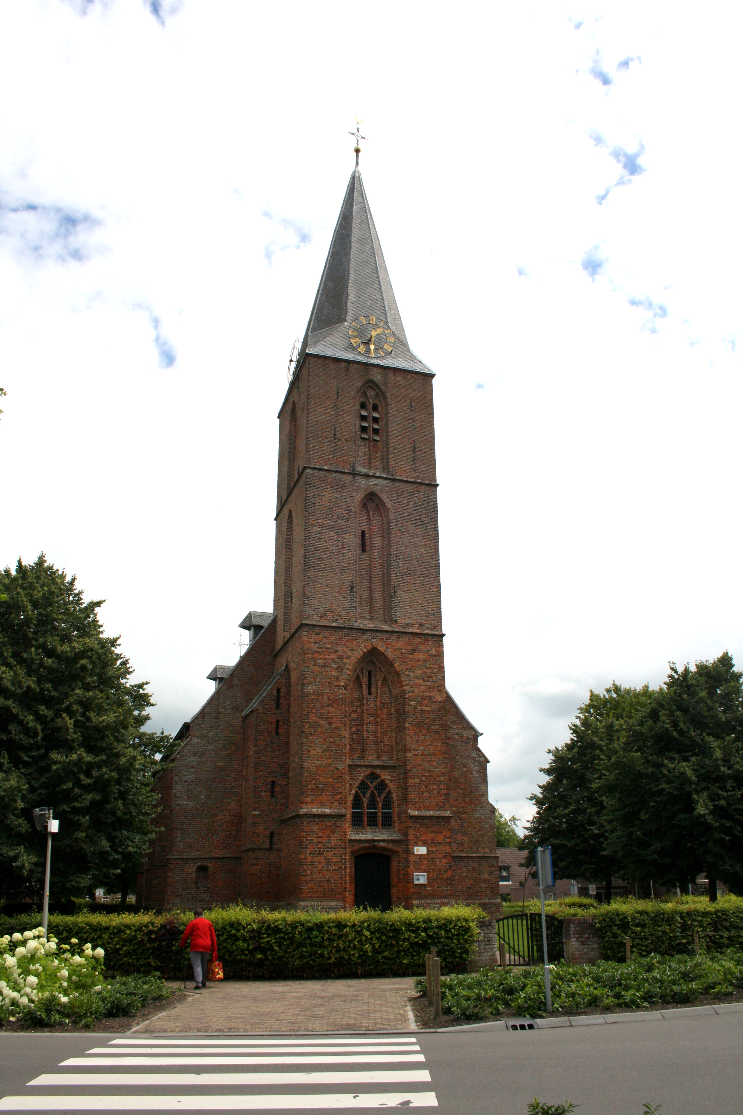 Drenthe - Beilen - Stephanuskerk - 15de eeuw